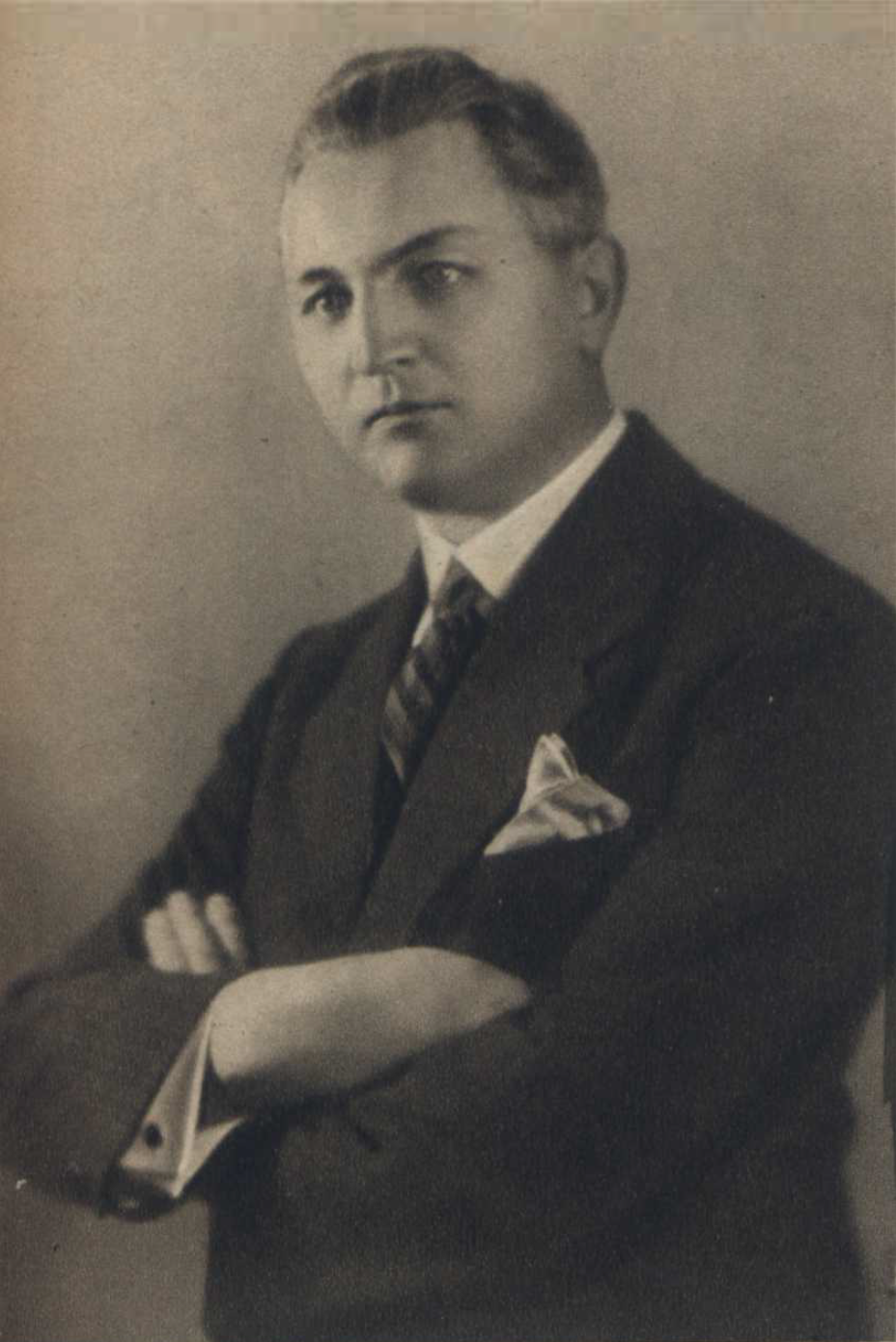 Jozef Sivák - slovenský politik, pedagóg, spisovateľ a novinár